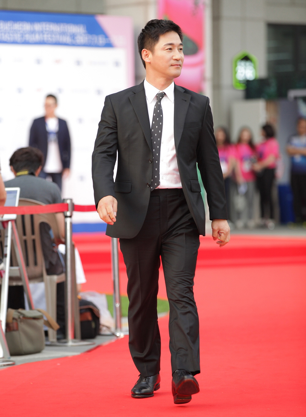 2017 부천국제판타스틱영화제(BIFAN) 레드카펫 . 전노민